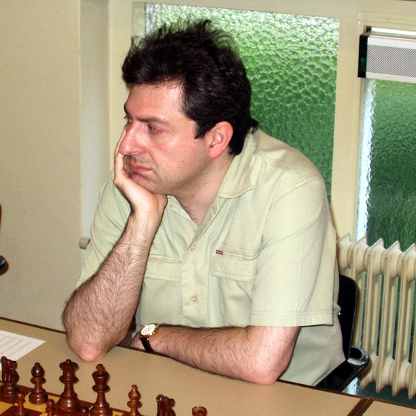 GM Alexandre Dgebuadze, Bussum 2007